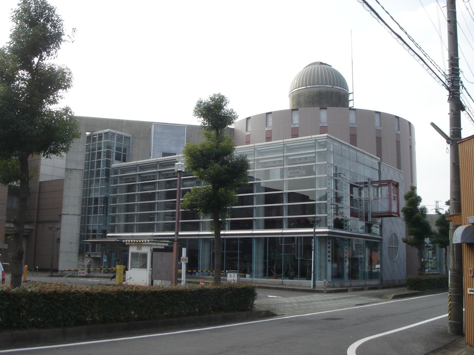 Science Plaza for children in Suitopai Center（スイトピアセンター、こどもサイエンスプラザ）, Ogaki, Gifu, Japan (岐阜県大垣市)で撮影。